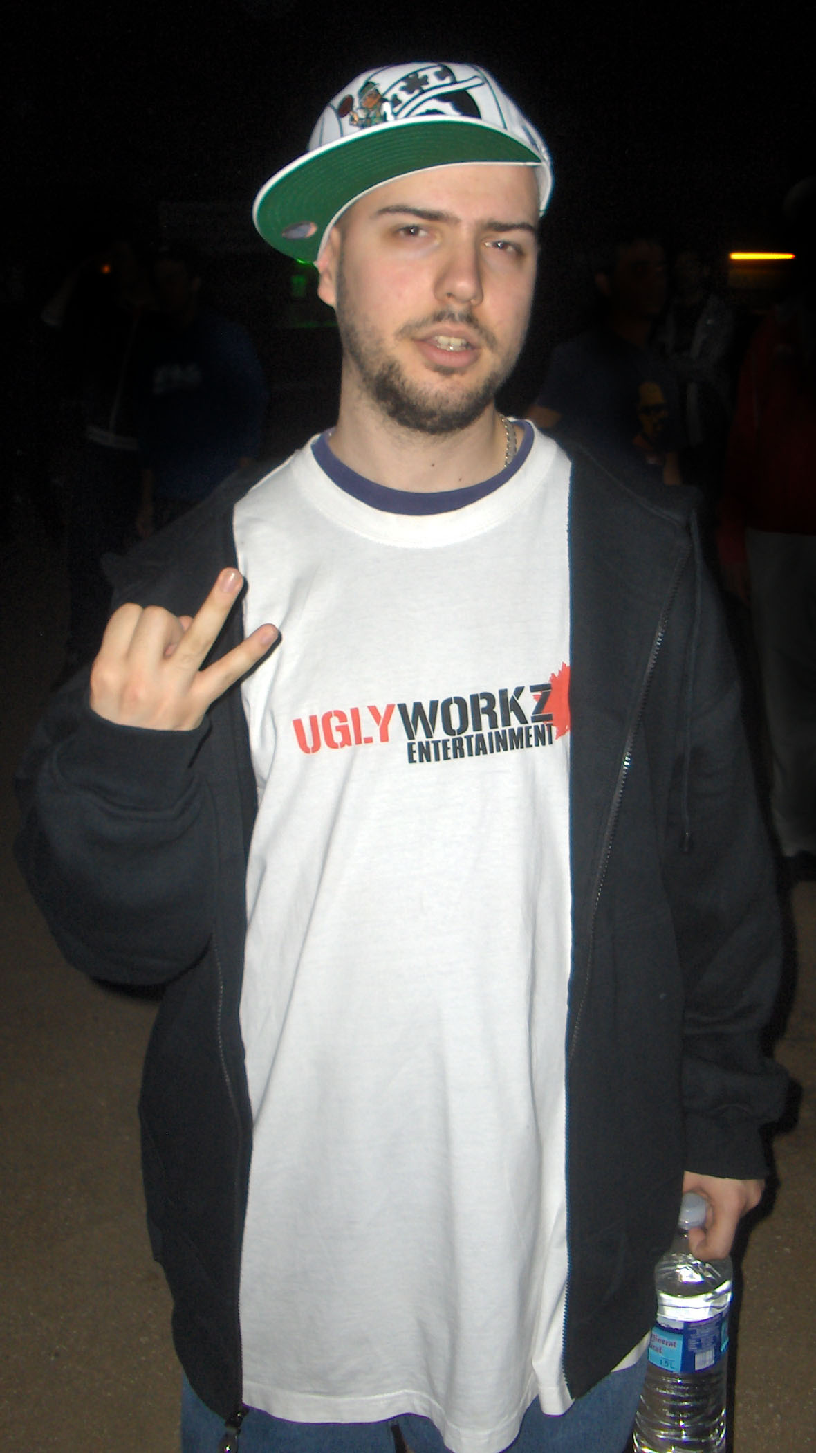 Mitsuruggy en un concierto en 2007